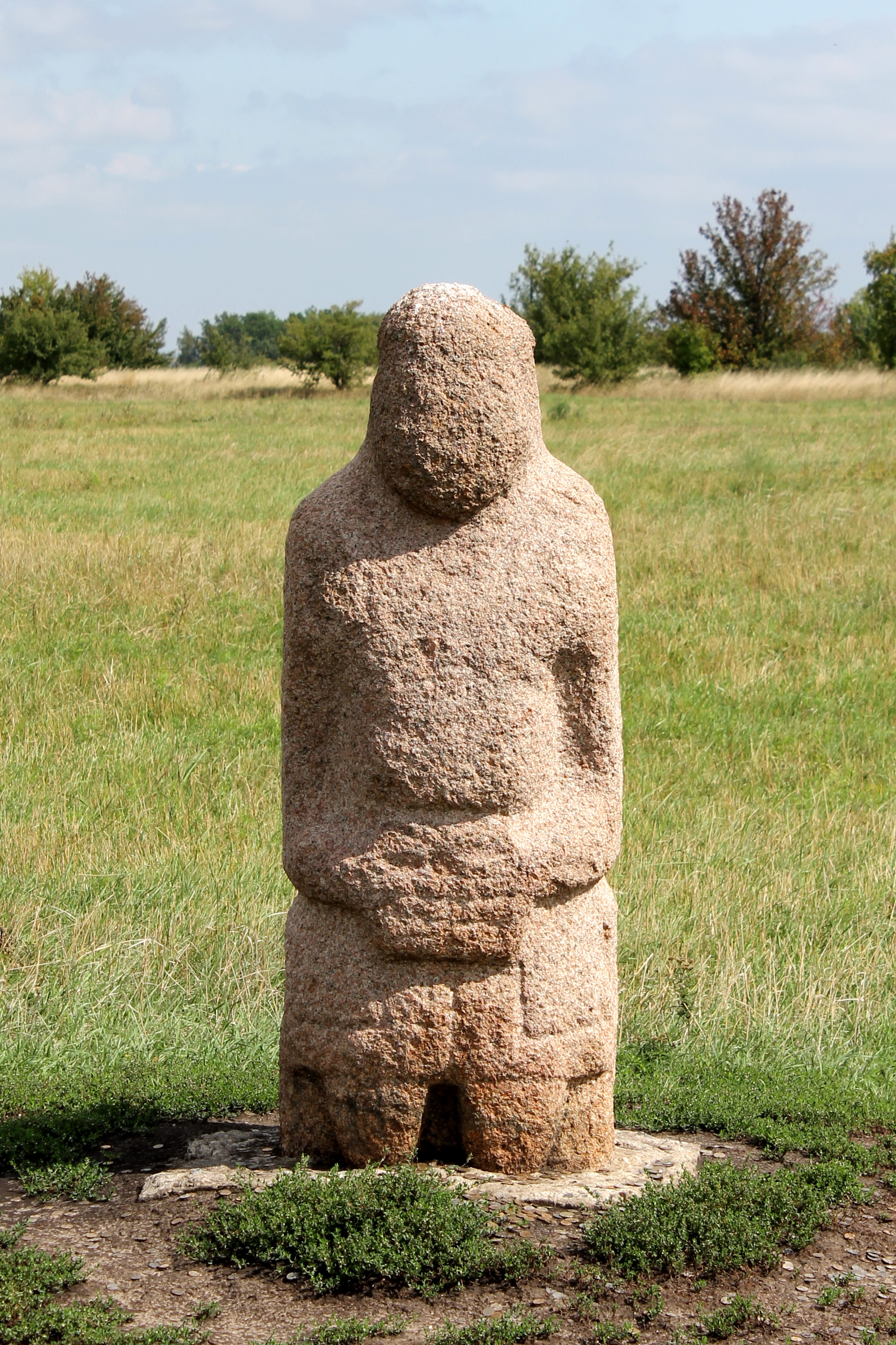 Статуя половецкого воина в Центрально-Чернозёмном государственном природном биосферном заповеднике имени В. В. Алёхина у посёлка Заповедный